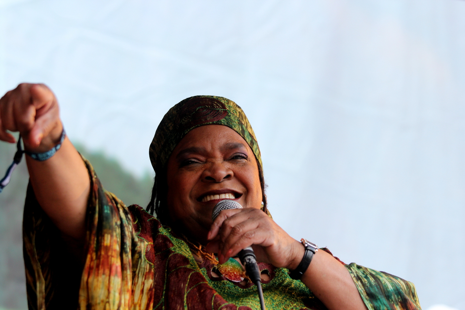 Angela Brown amerikansk blues og soul artist